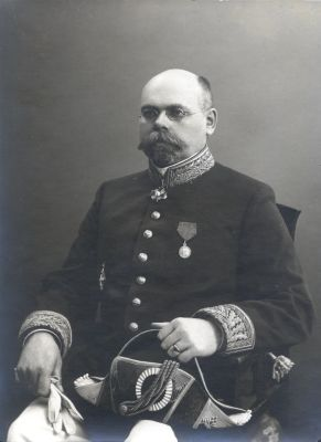 Vissarion Aleksejev